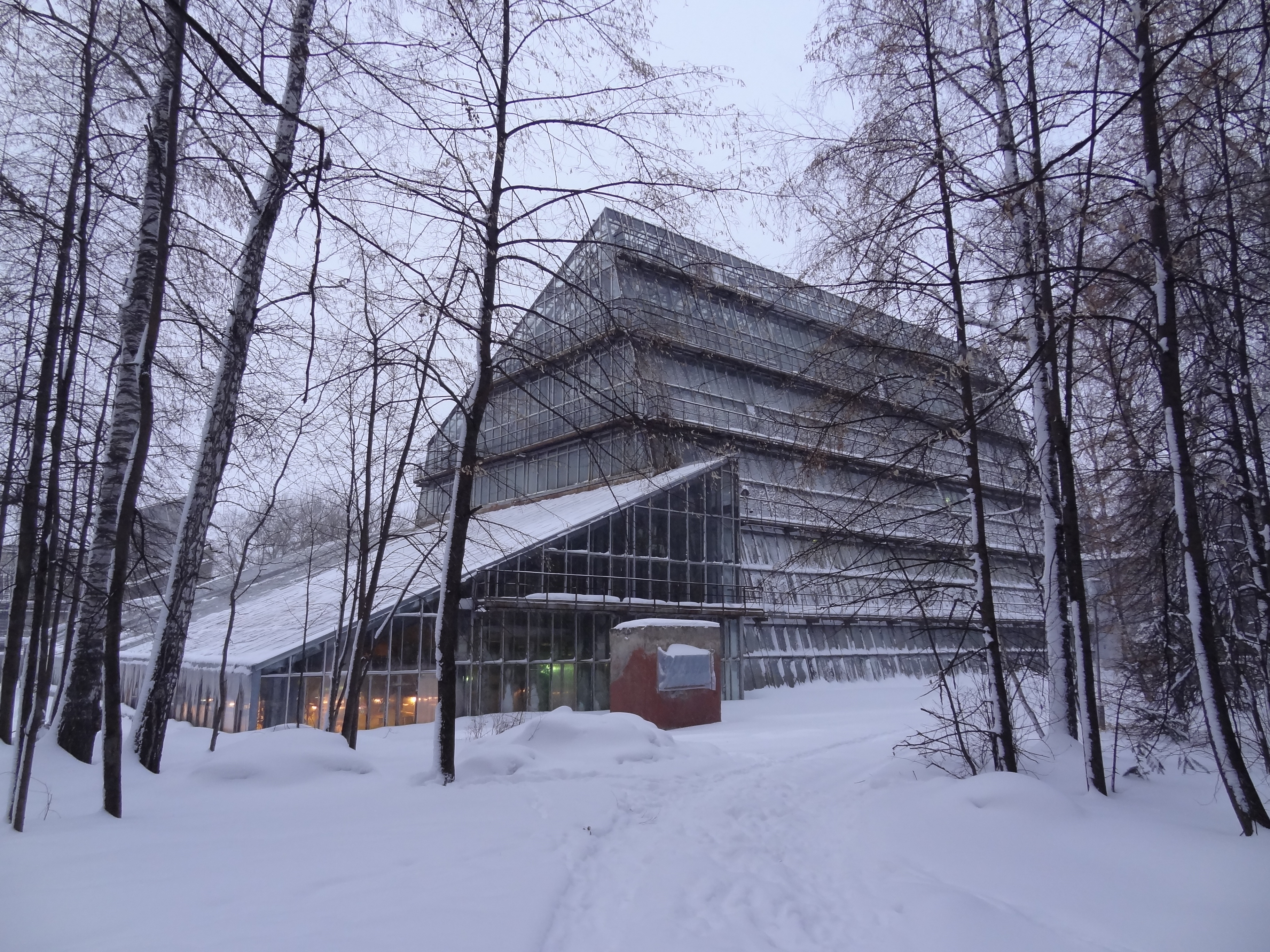 Tomsk, Tomsk Oblast, Russia